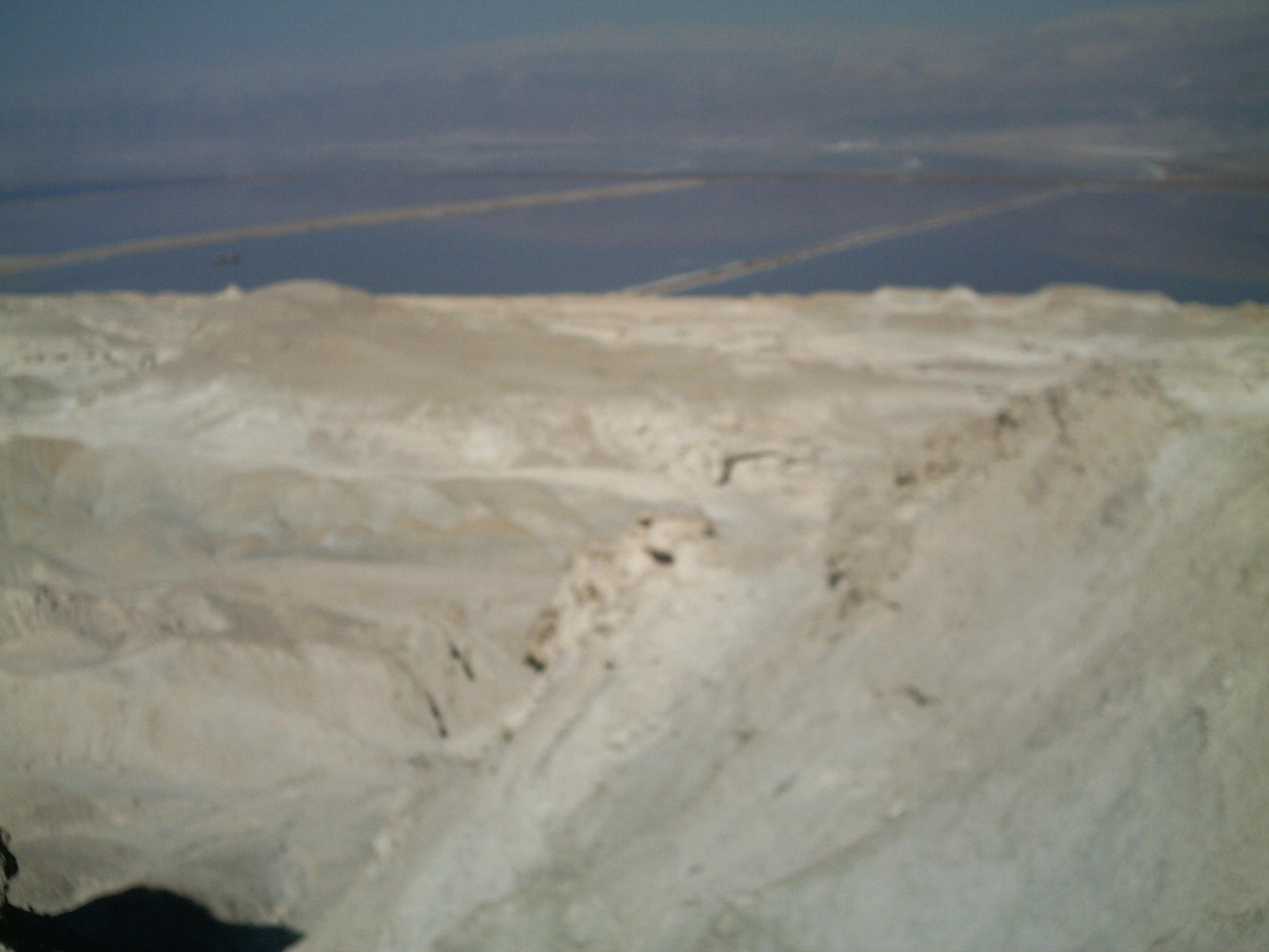 הבריכות בדרום ים המלח נשקפים מהר סדום